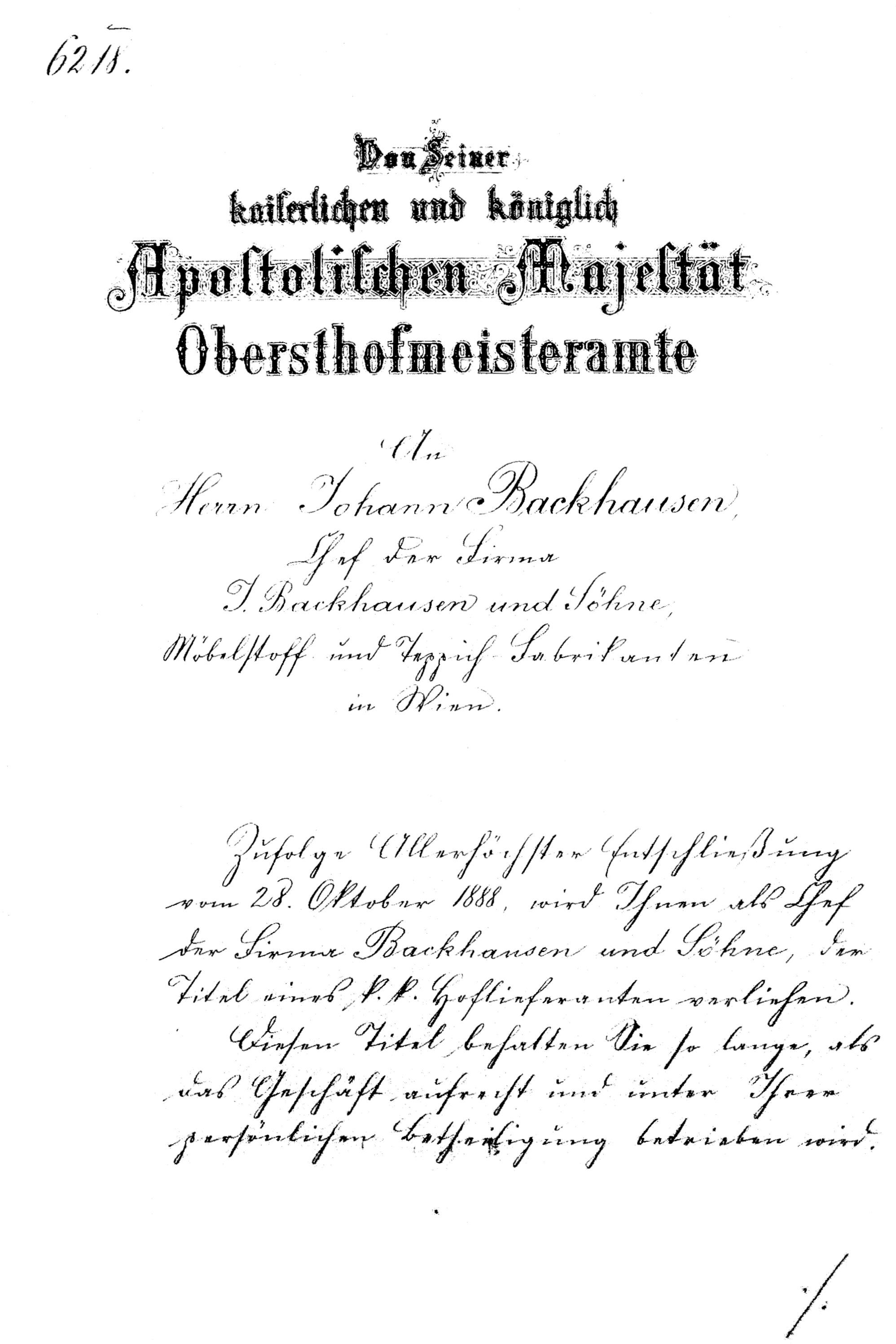 Verleihung des k.u.k. Hoflieferantentitels an Herrn Johann Backhausen, Chef der Firma Joh. Backhausen & Söhne, Möbelstoff- und Teppichfabrikanten in Wien. Zufolge Allerhöchster Entschließung vom 28. Oktober 1888, wird Ihnen als Chef der Firma Backhausen u. Söhne der Titel eines k.k. Hoflieferanten verliehen. Diesen Titel behalten Sie so lange, als das Geschäft aufrecht und unter Ihrer persönlichen Beteiligung betrieben wird. Kraft desselben steht Ihnen das Recht zu, bei Ihrer Firma den kaiserlichen Adler zu führen, doch dürfen Sie sich des kaiserlichen Wappens im Siegel nicht bedienen. Seiner k.u.k. Apostol. Majestät 1. Obersthofmeister vom Obersthofmeisteramte Wien, am 8. November 1888